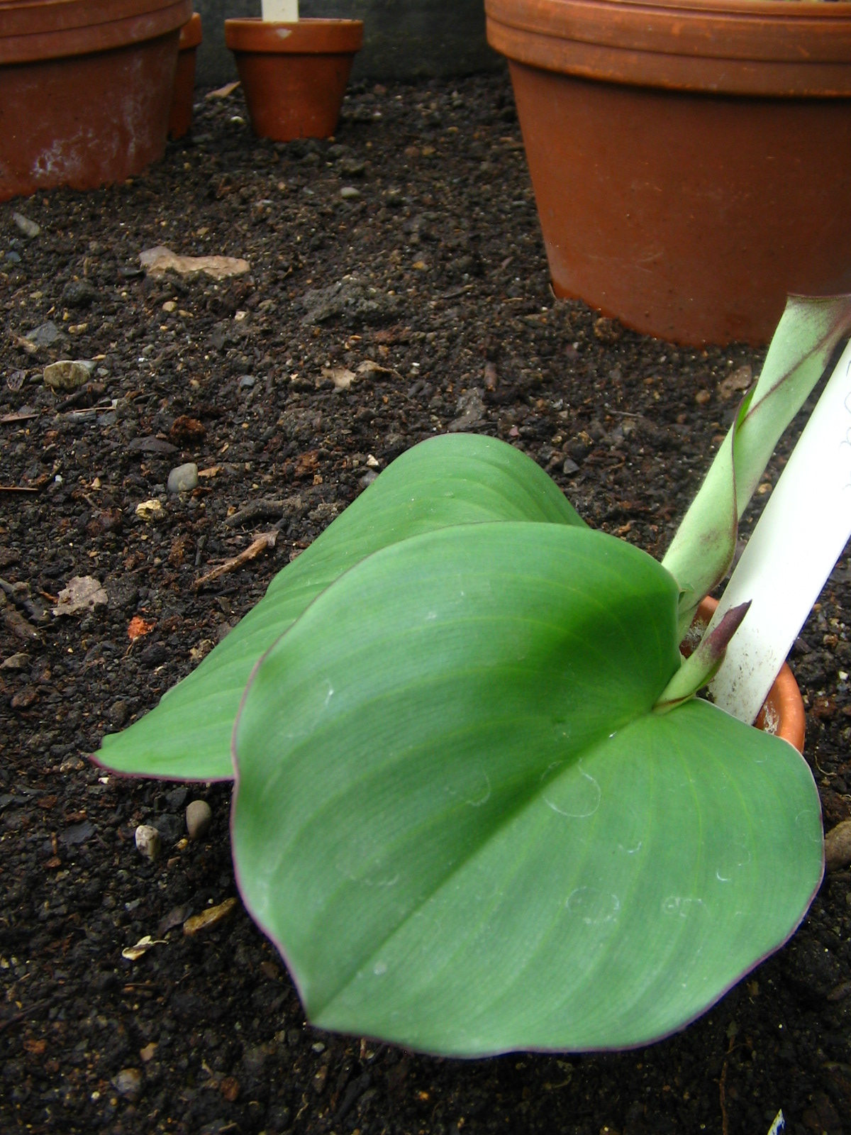 Kaempferia galanga made by myself. No flower unfortunately